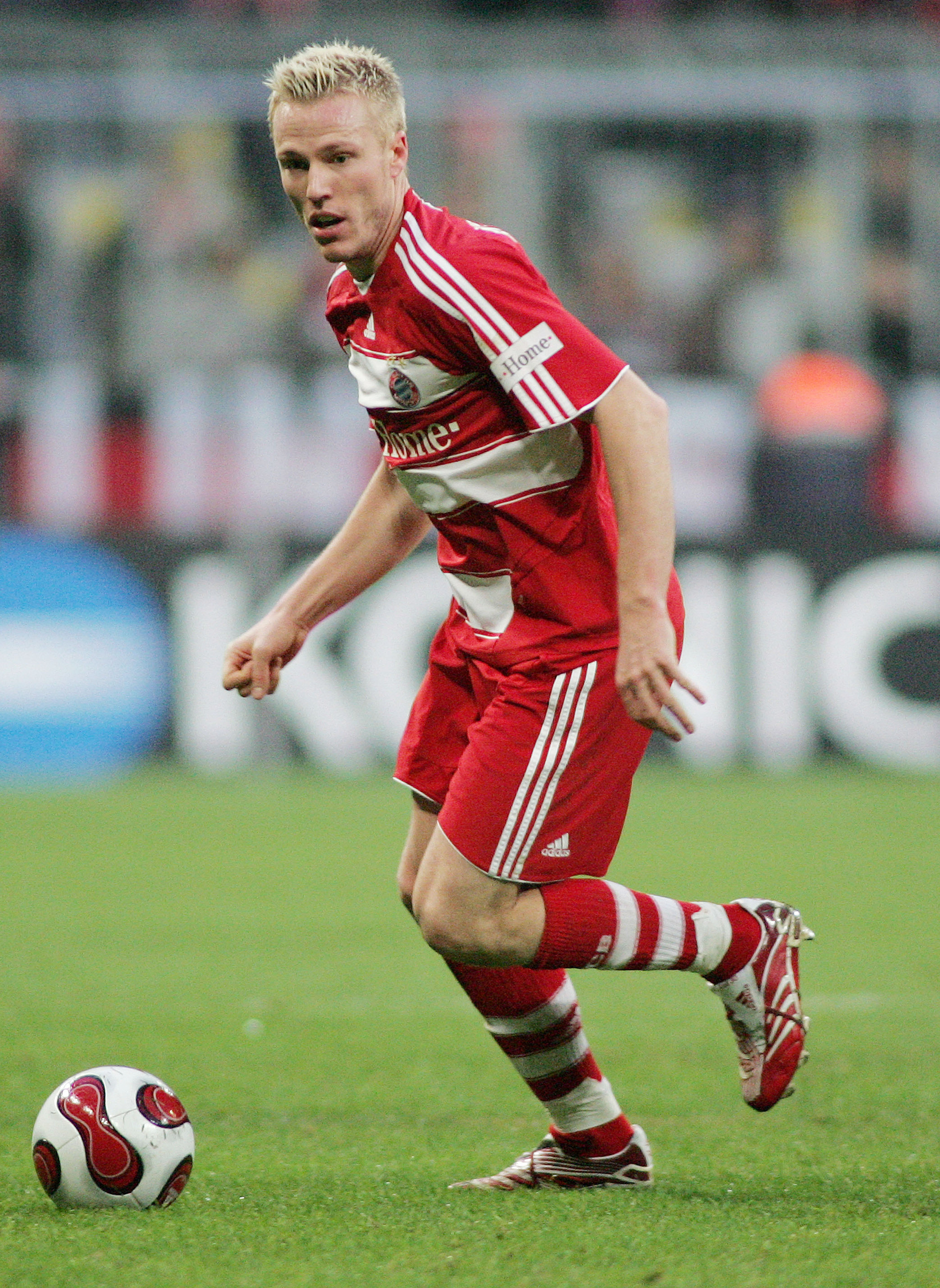 Christian Lell, 1. Bundesliga, FC Bayern München